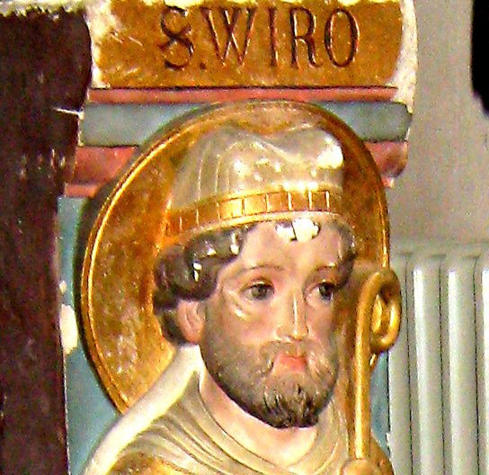 3 doppelseitige Statuen in der Kapelle Unserer Lieben Frau in St. Odiliënberg